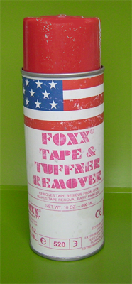 Spray zur leichteren Entfernung von Tapeverbänden eines ausländischen Herstellers